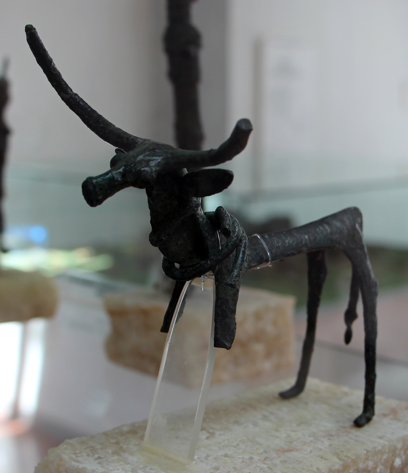 Museo archeologico nazionale G.A. Sanna - MIBAC The making of this document was supported by Wikimedia CH. (Submit your project!) For all the files concerned, please see the category Supported by Wikimedia CH. This is a photo of a monument which is part of cultural heritage of Italy.